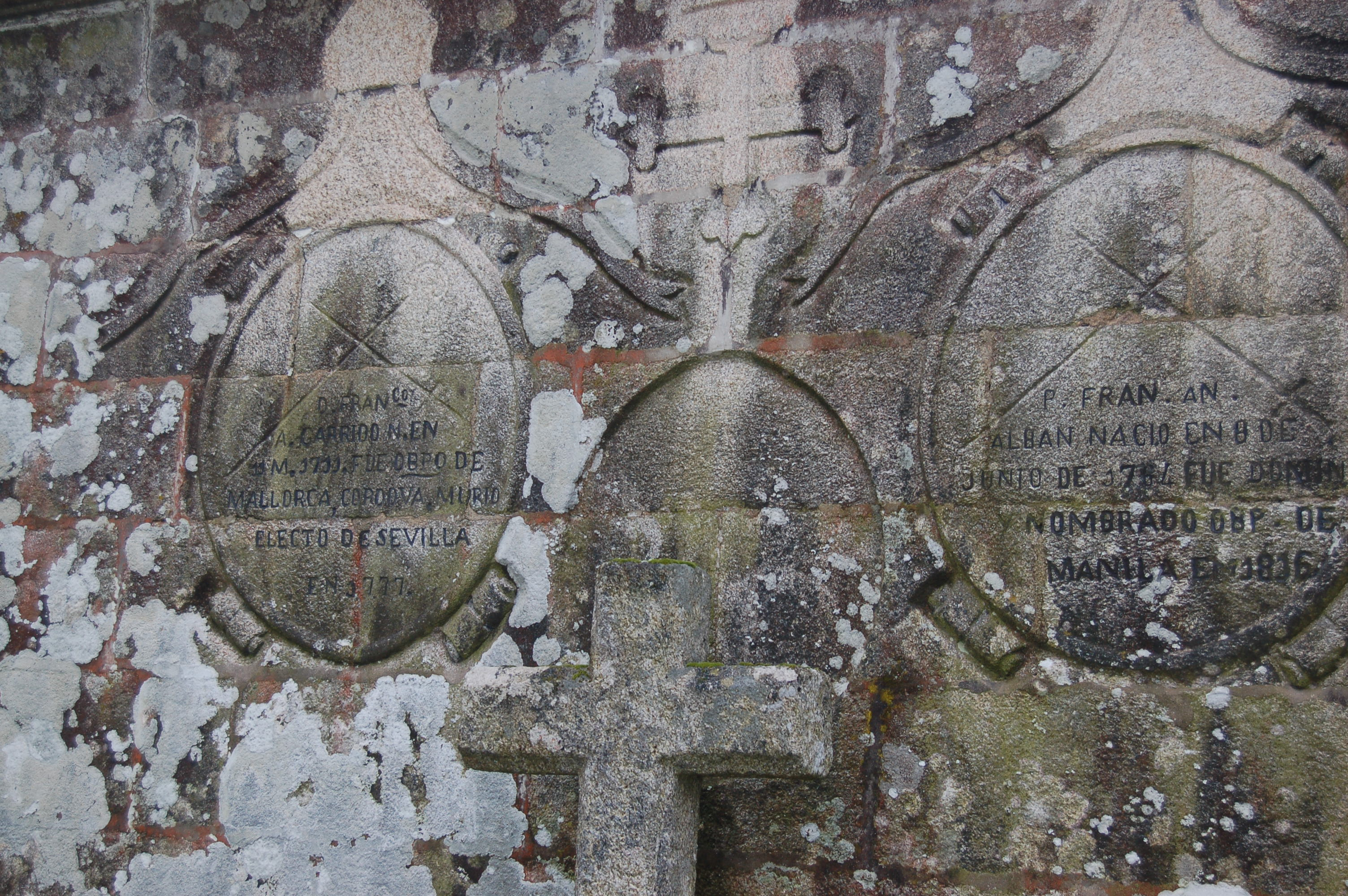 Tumbas de Francisco Garrido de la Vega e Francisco Antonio Albán Barreiro no cemiterio de Verducido (A Lama)